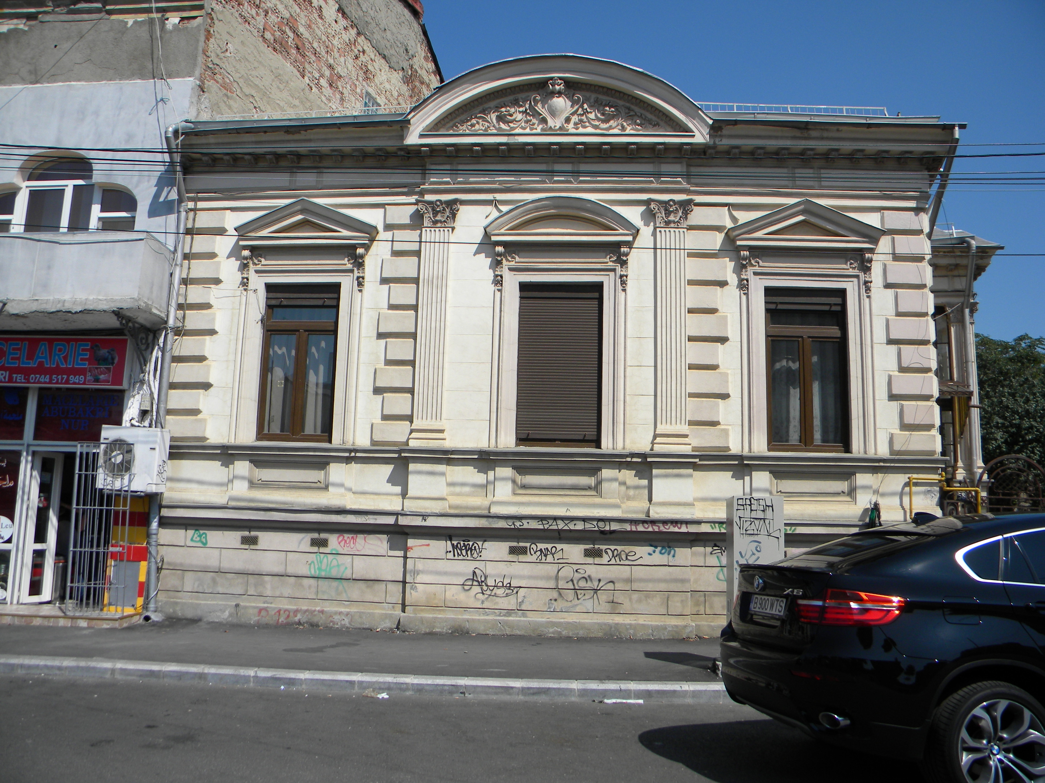 Casa pe Str. Berzei nr. 58, Bucuresti sect. 1.JPG